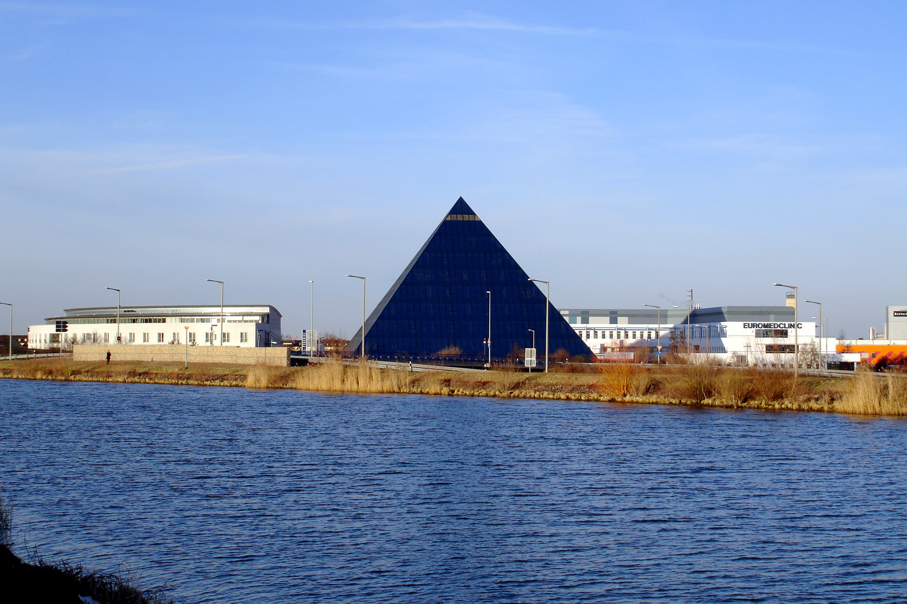 Euromedclinic mit Hotelpyramide an der Europaallee in Fürth